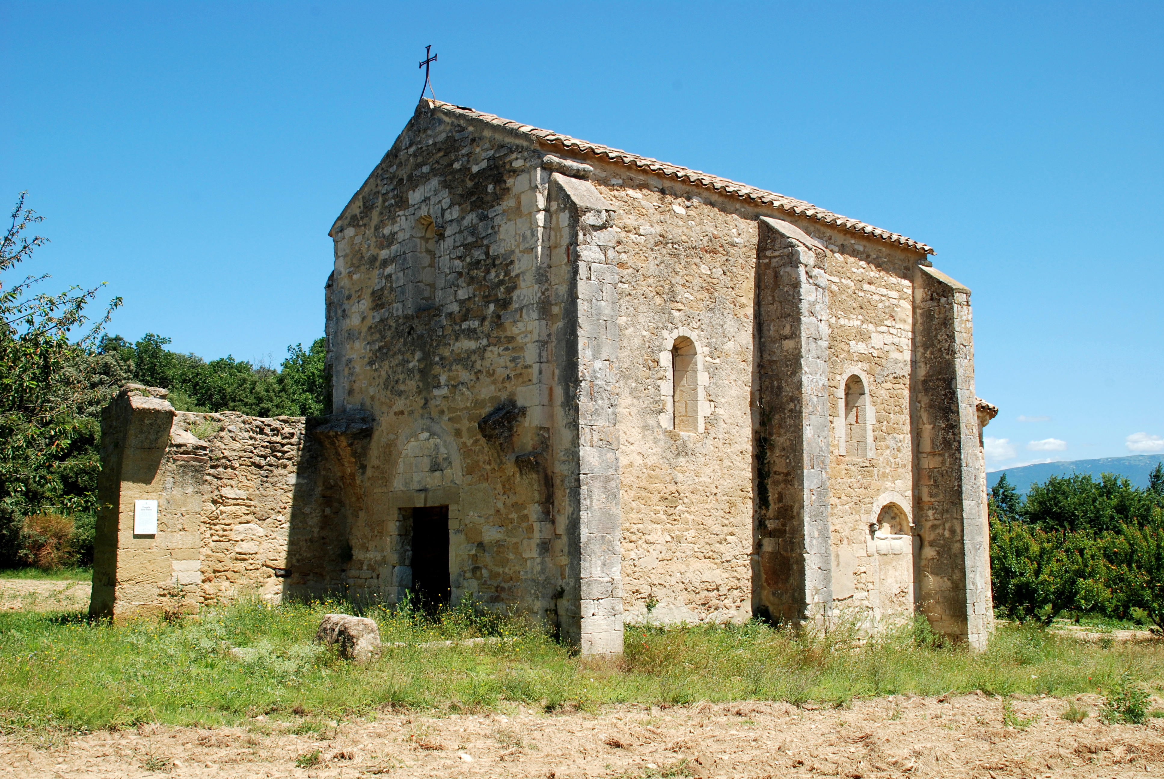 France - Église Saint-Pierre-ès-Liens de Colonzelle